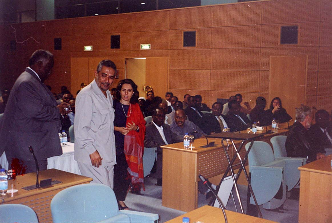 جانب من مفاوضات اتفاقية سلام شرق السودان